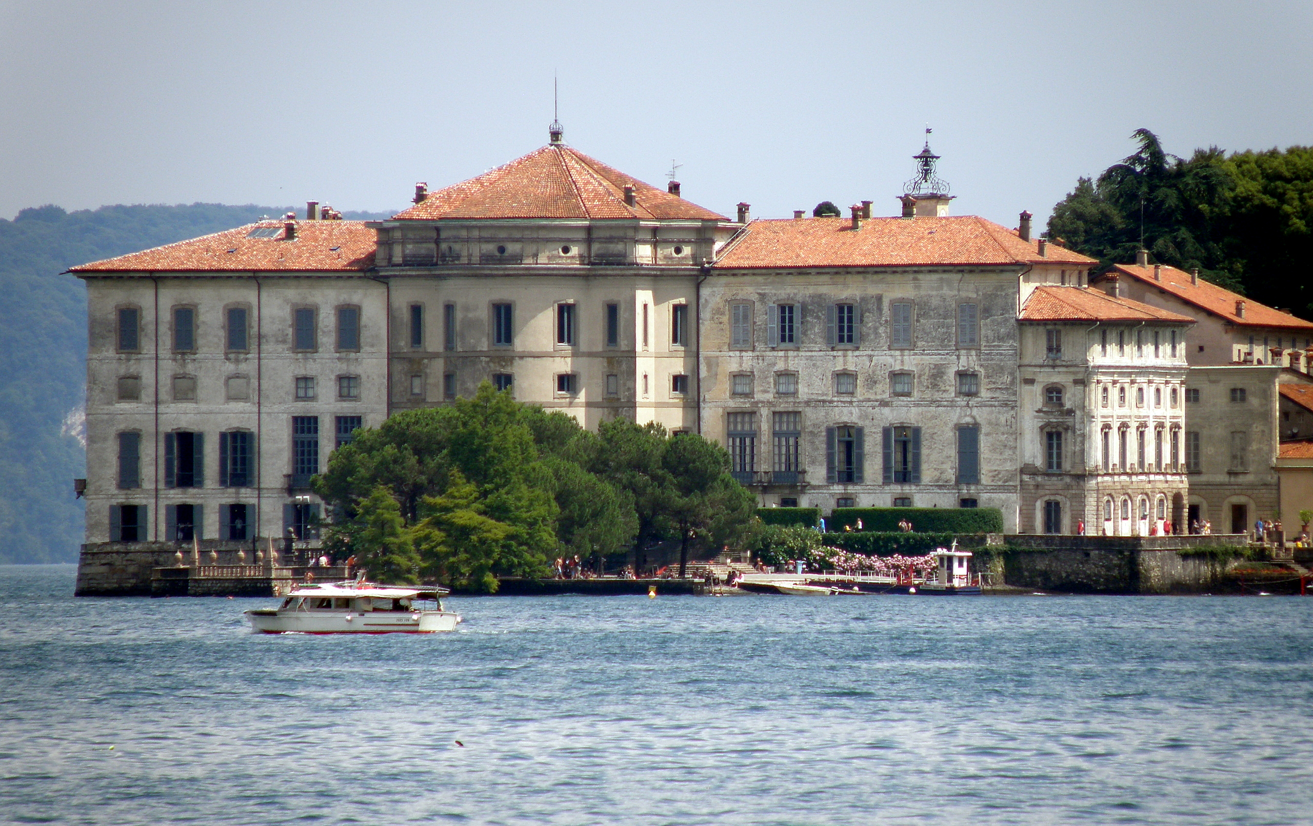 Stresa (VB). Isola Bella (Lago Maggiore), vista dalla riva del lago tra Baveno e Stresa. Facciata nord del Palazzo Borromeo. Guardiamo verso sud-est.